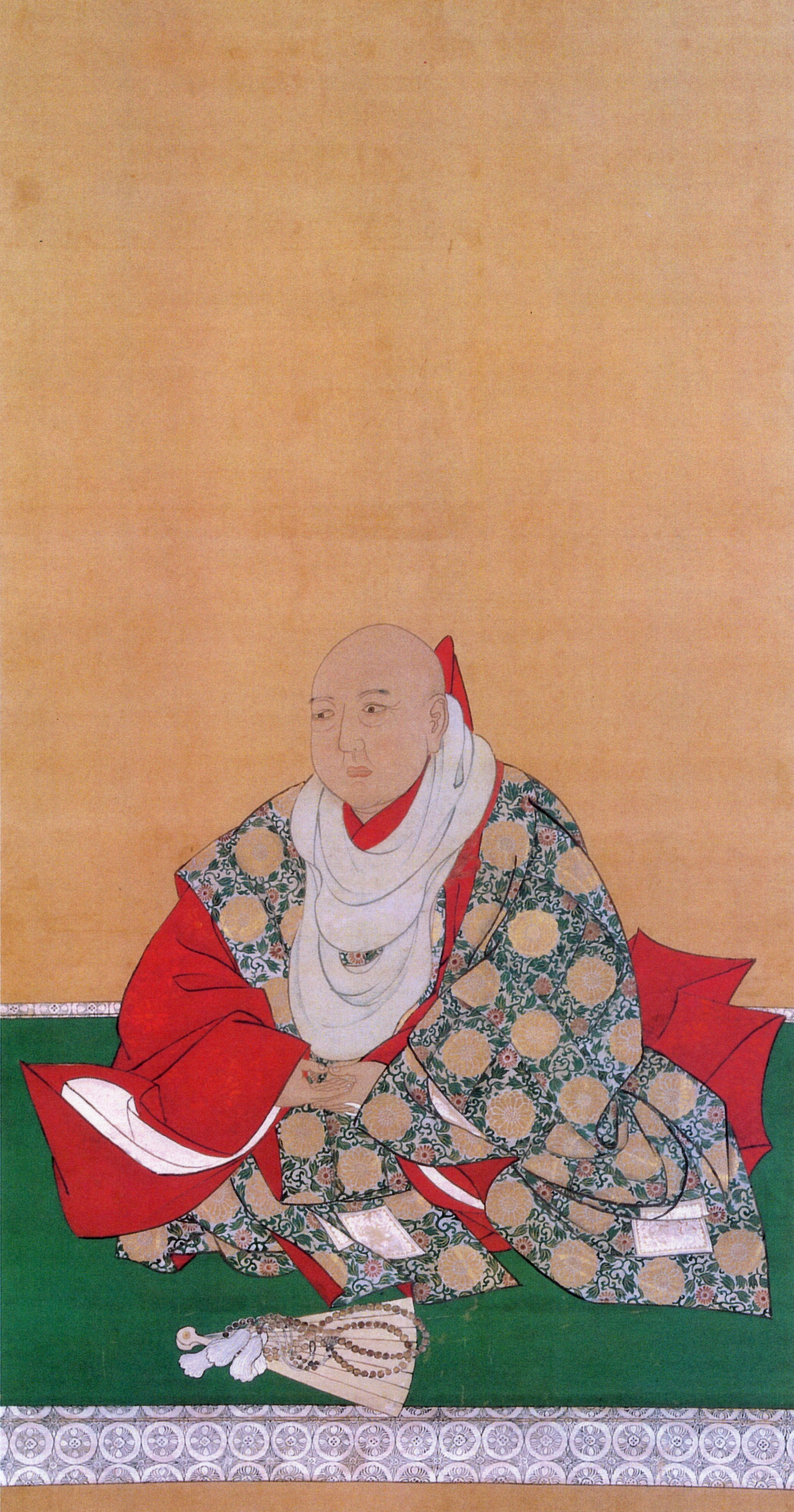 妙法院宮堯然法親王の肖像。